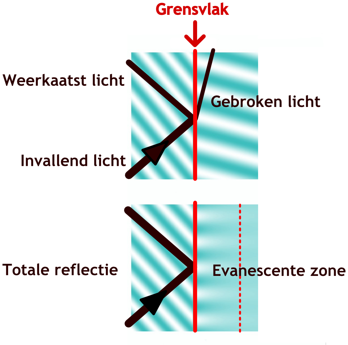 Voorstelling van een evanescente golf en een gebroken golf aan een grensvlak